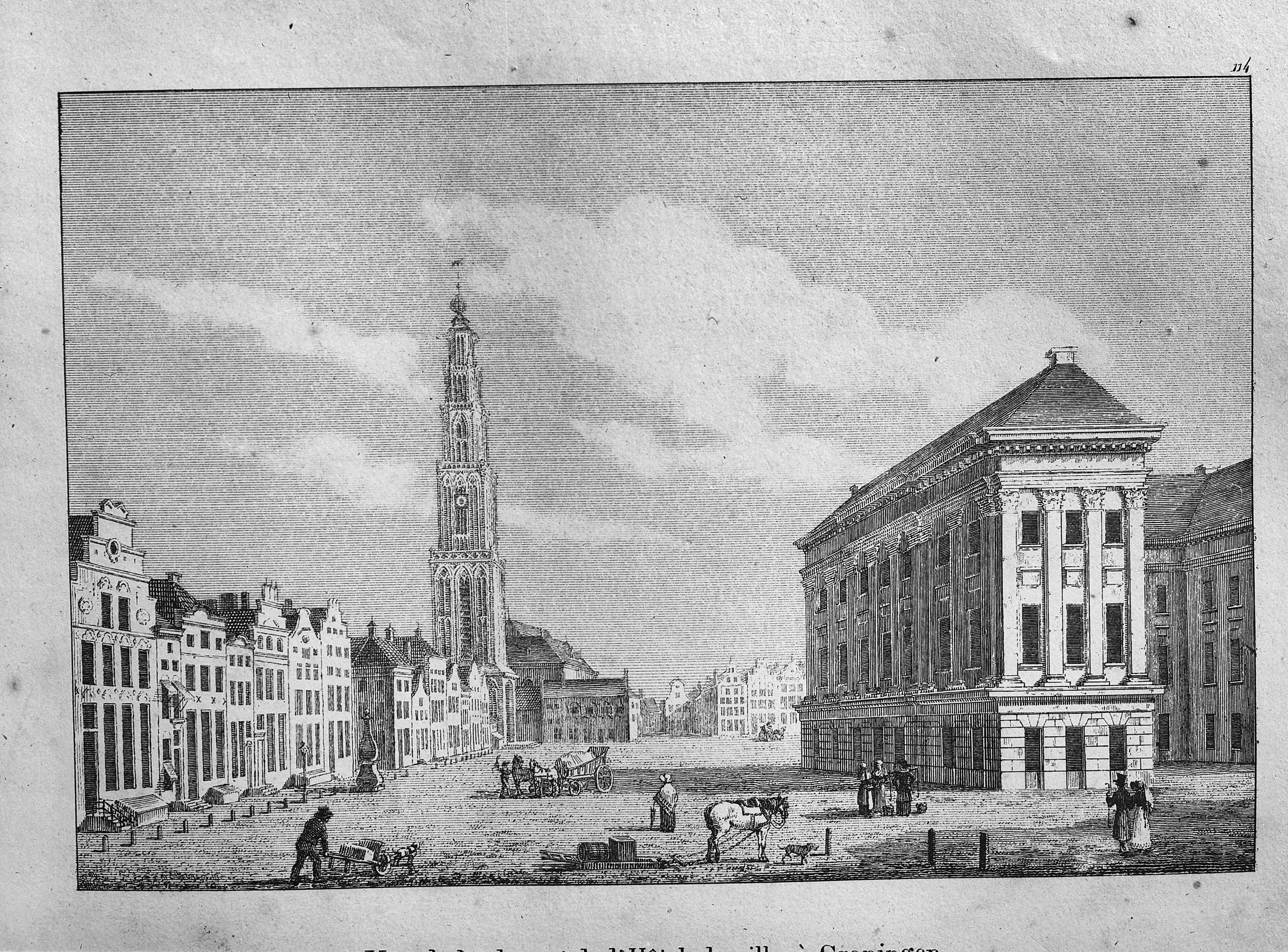 Grote markt: Markt, stadhuis en Martinitoren, litho nr. 114 uit Voyage Pittoresque door De Cloet